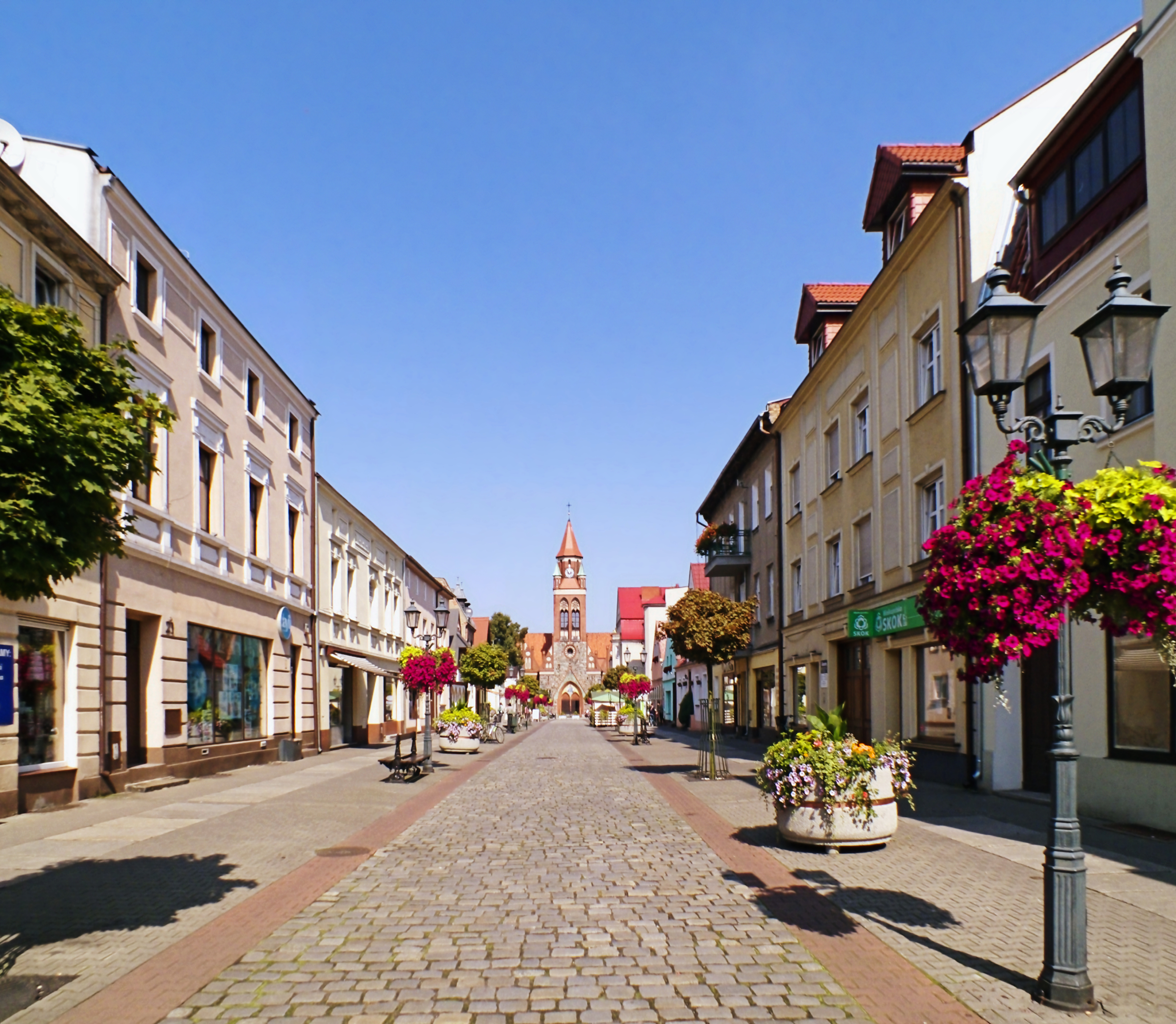 Ulica Szeroka w Grodzisku Wielkopolskim